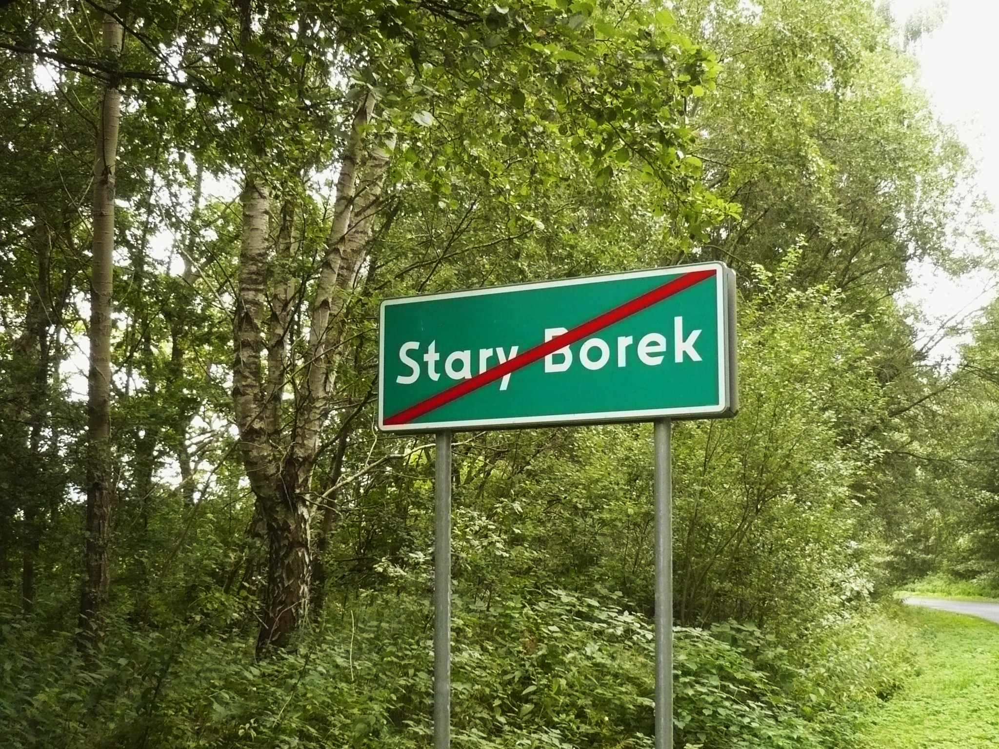 Stary Borek, znak drogowy